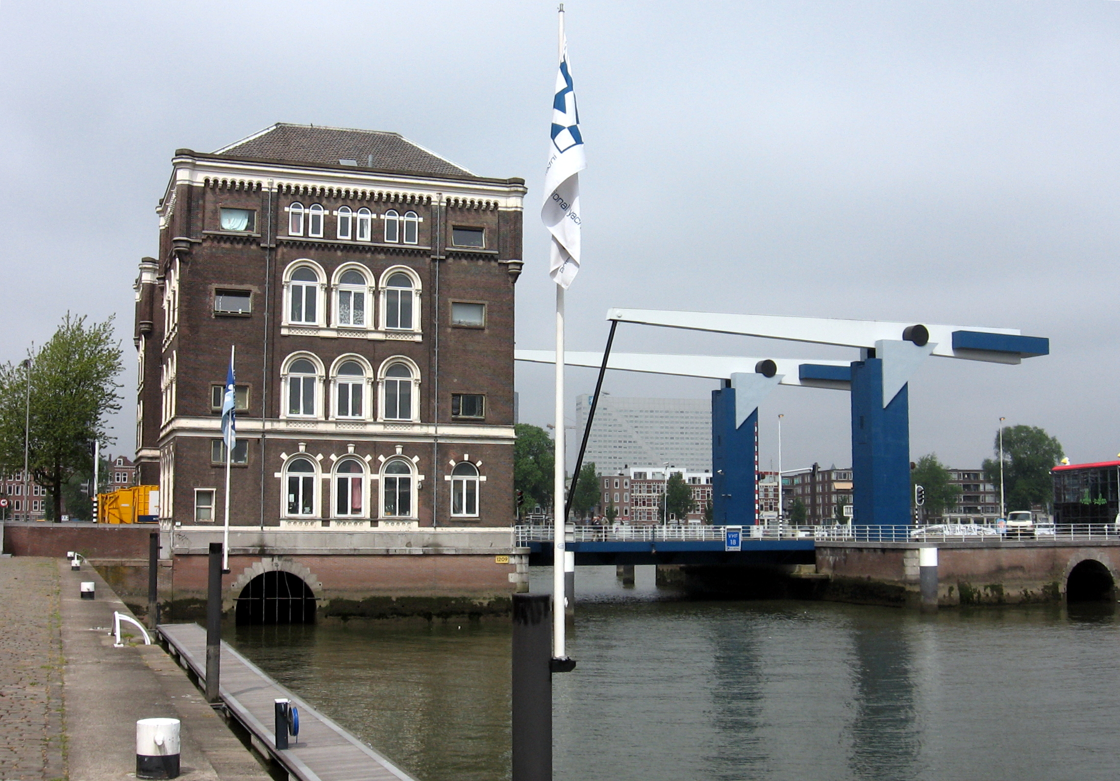 Poortgebouw, Binnenhaven